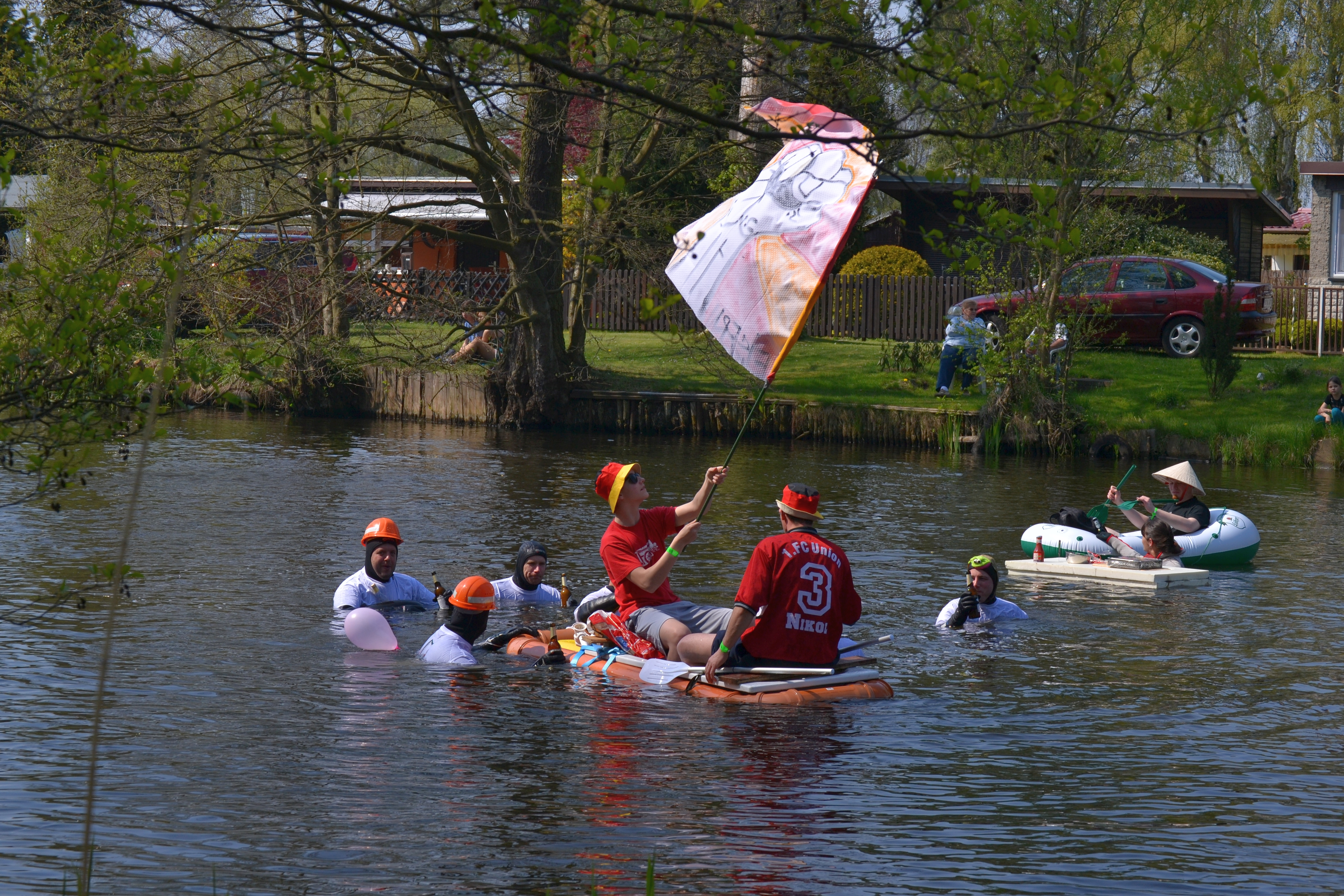 17. Spreetreiben von Neu Zittau nach Erkner am 19. April 2014 kurz hinter dem Start an der Brücke Neu Zittau